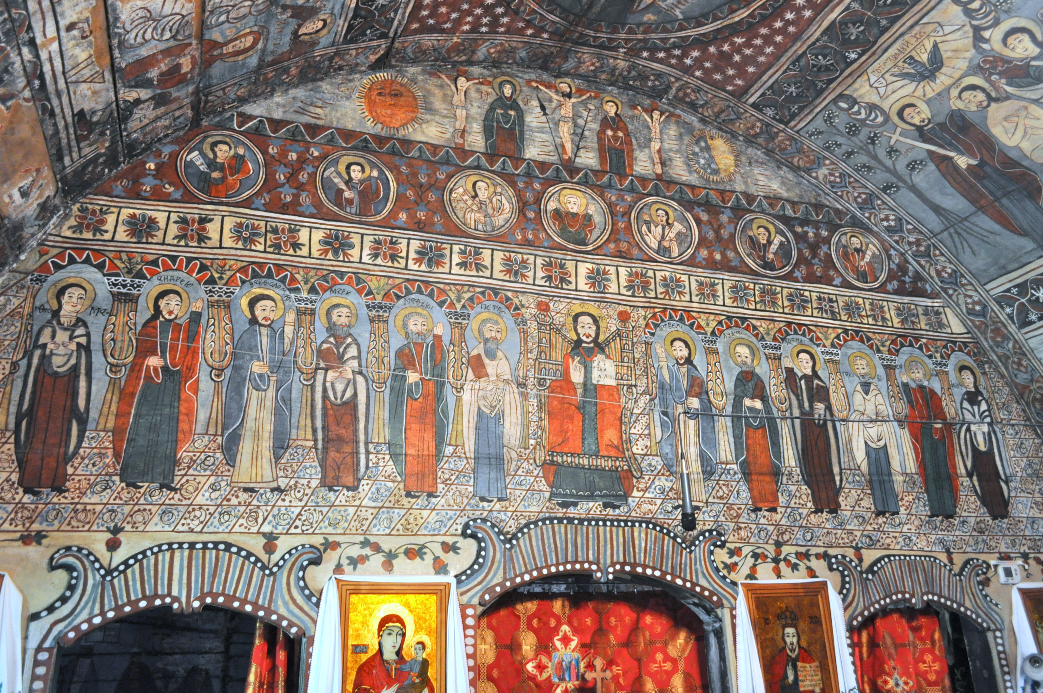 Biserica de lemn „Sf. Arhangheli Mihail şi Gavriil" din Tăuți, județul Cluj